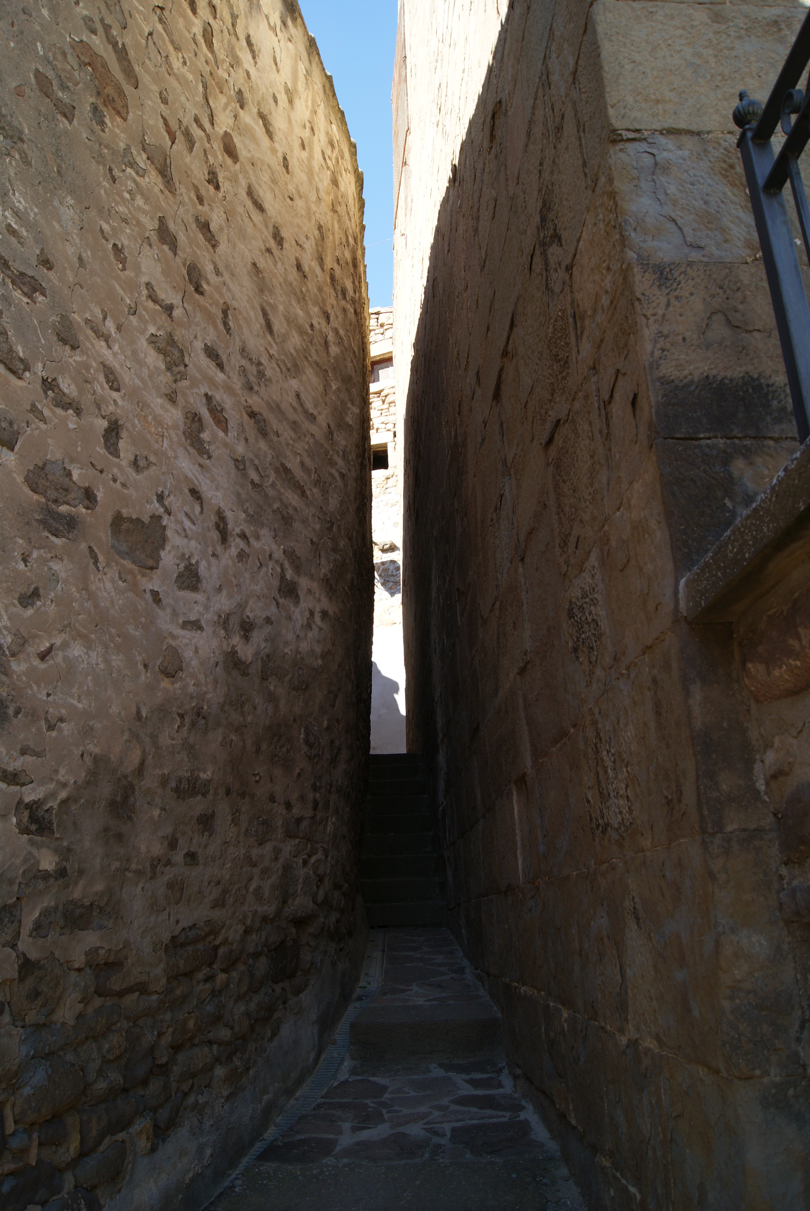 Urriés (Zaragoza) - El Callejón